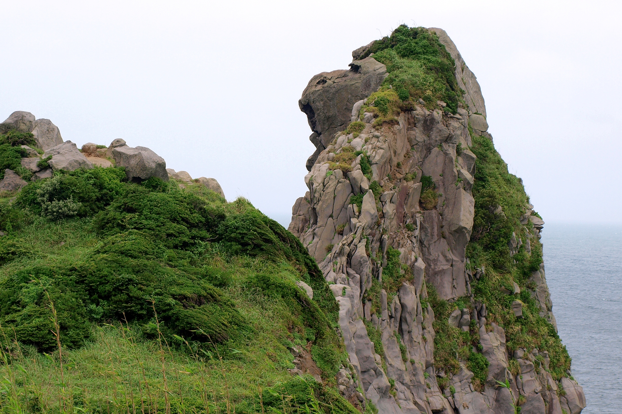 長崎県壱岐市にある「猿岩」。名前の由来は、見る角度によって猿の顔に見えることから。